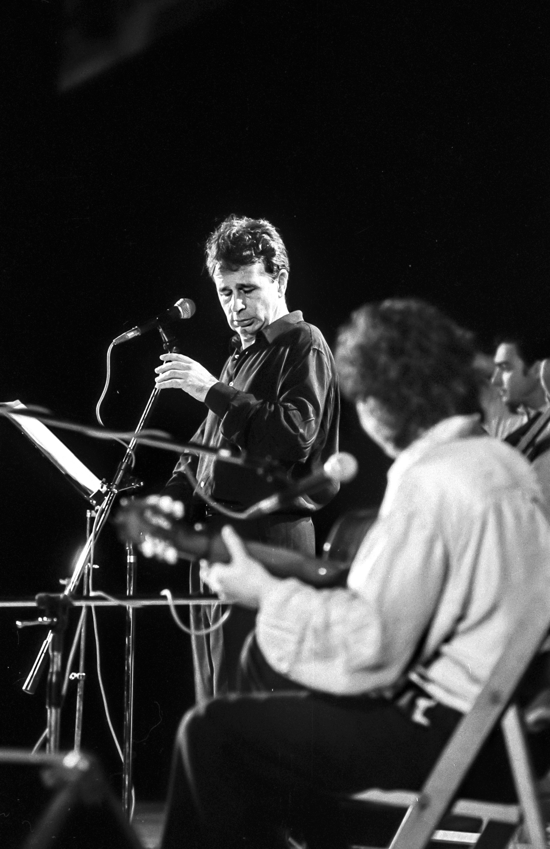 Actuación en Alcoi de Ovidi Montllor